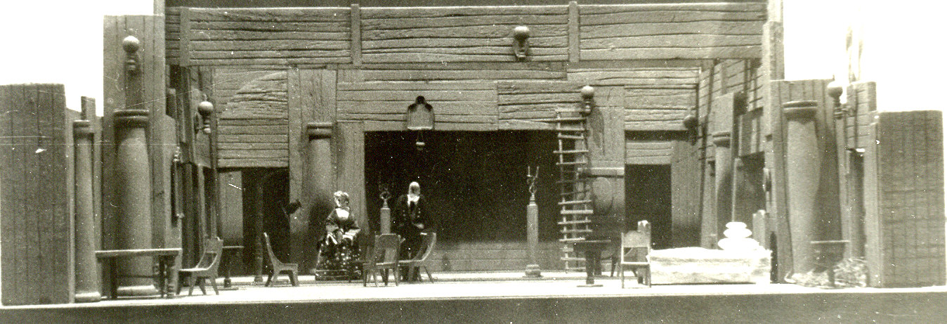 Фотография макета декорации А. Опарина к спектаклю Московского театра им. Н. Гоголя "Доходное место". 1977